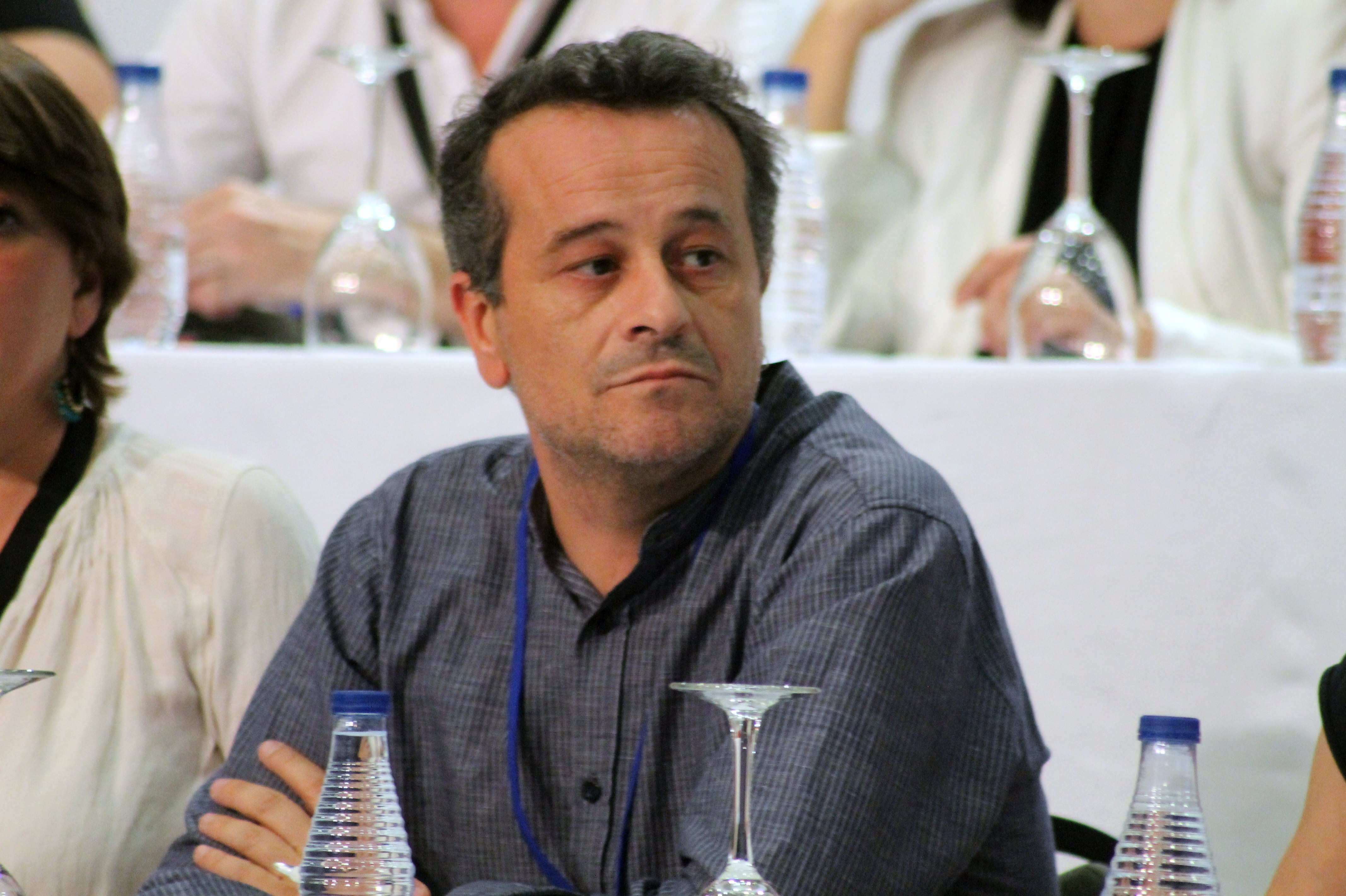 El político español de IU, José Antonio Castro